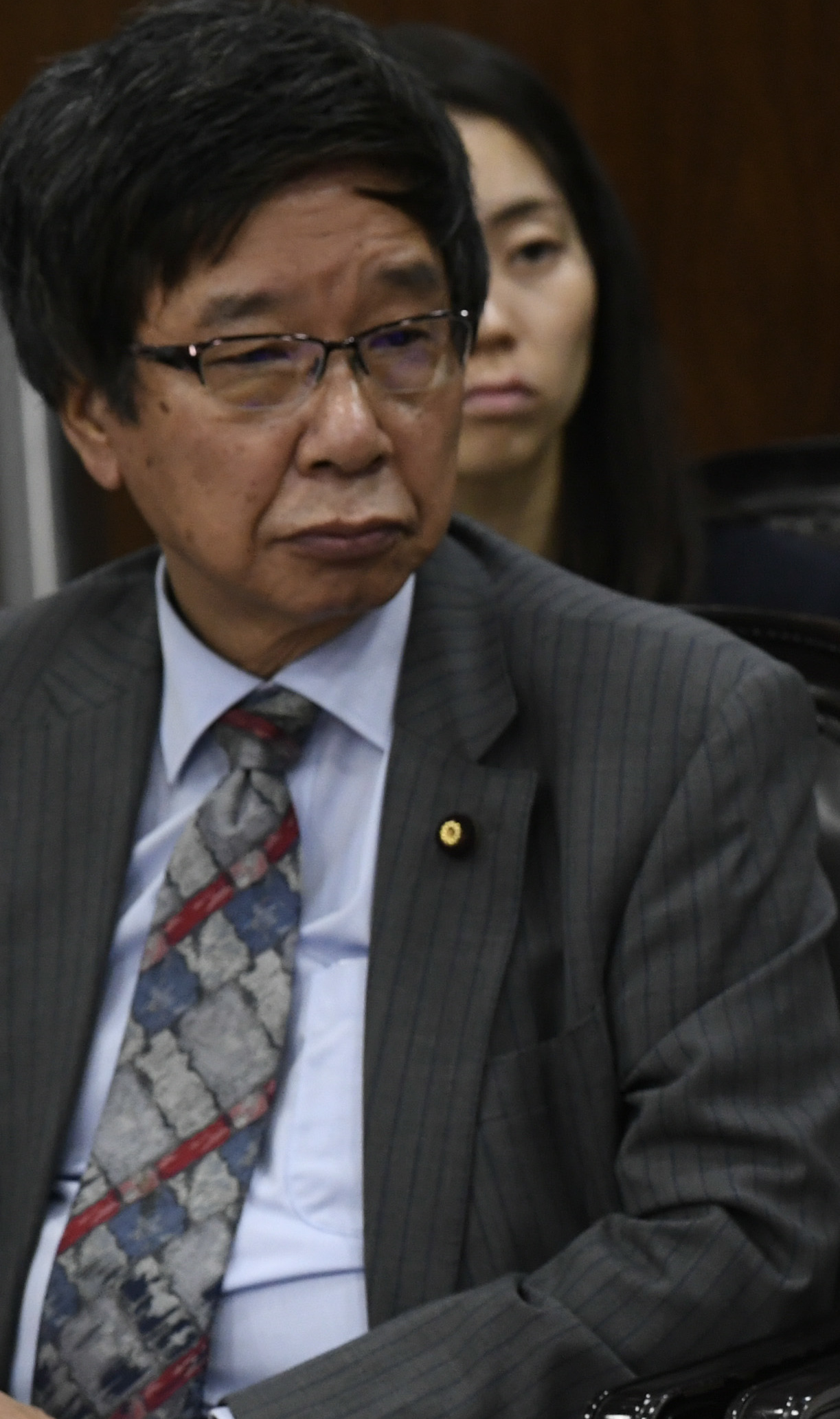 Visita oficial da presidente da Câmara dos Conselheiros do Japão (Câmara Alta da Dieta Nacional do Japão) e delegação. Participam: membro da Câmara dos Conselheiros, Partido Comunista Japonês, Mikishi Daimon; membro da Câmara dos Conselheiros Nippon Ishin (Japan Innovation Party), Mitsuko Ishii; membro da Câmara dos Conselheiros Komeito, Makoto Nishida. Foto: Roque de Sá/Agência Senado